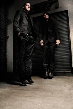 Rapper Tua und Sänger Vasee im Jahr 2010